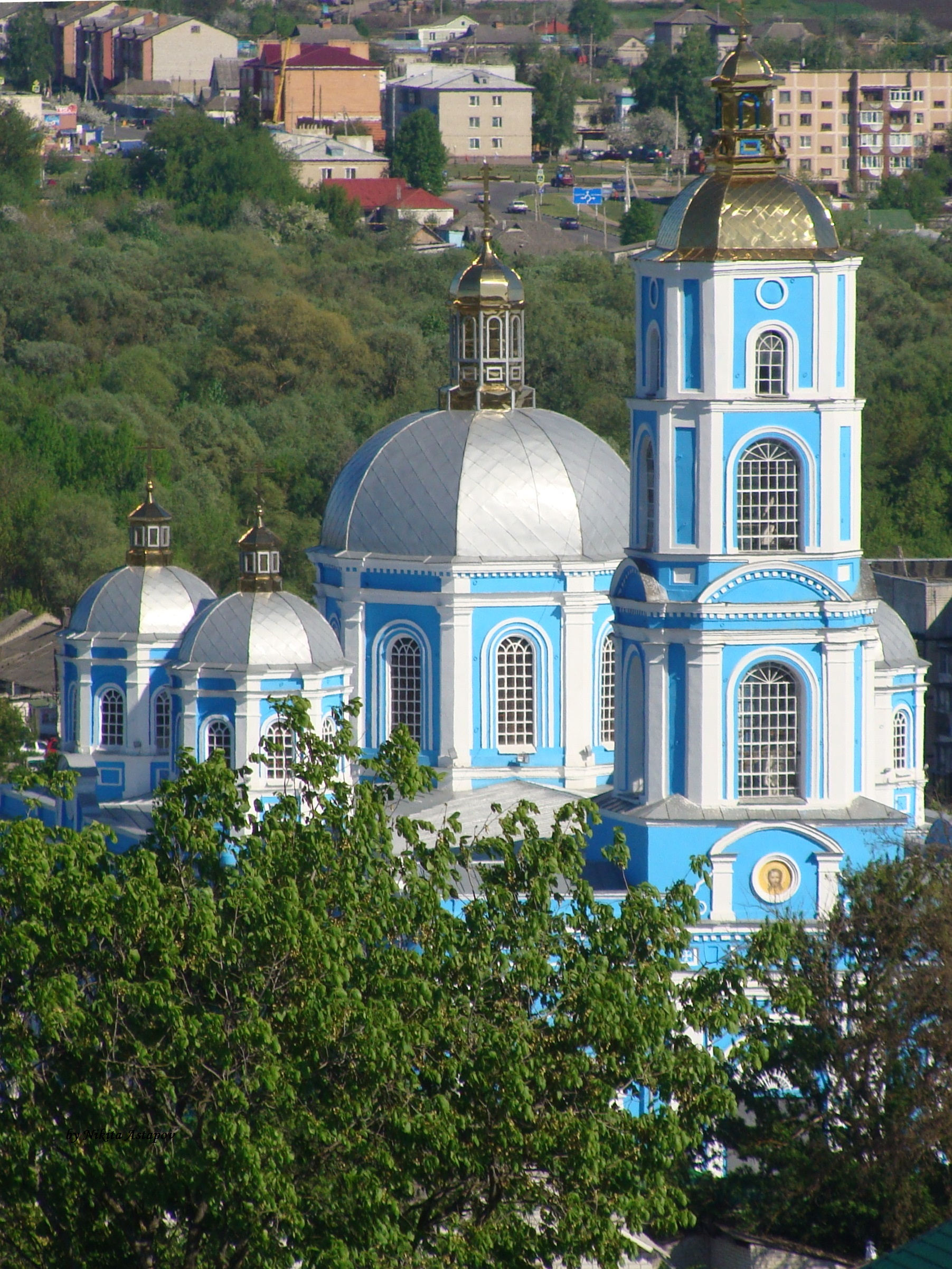 Церковь Рождества Пресвятой Богородицы с интерьером (Белгородская область,город Короча)